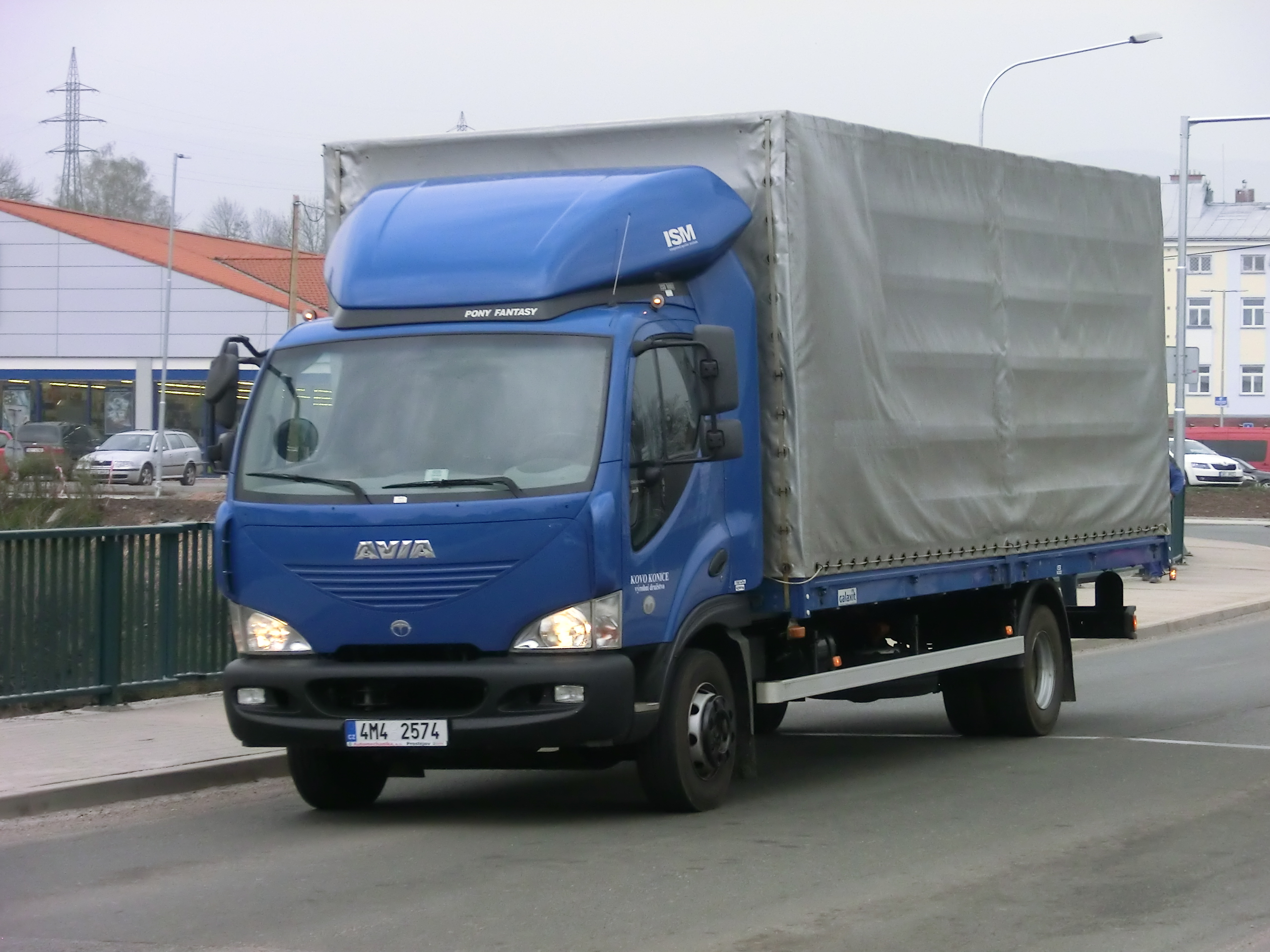 Dálkový valník Avia D120-210 ve Vrchlabí.